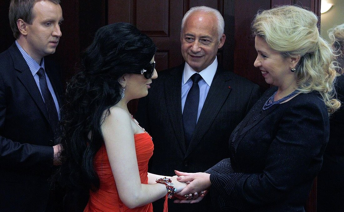 Международный благотворительный фестиваль «Белая трость. Без границ». Певица Диана Гурцкая с супругом Петром Кучеренко, Владимир Спиваков и Светлана Медведева